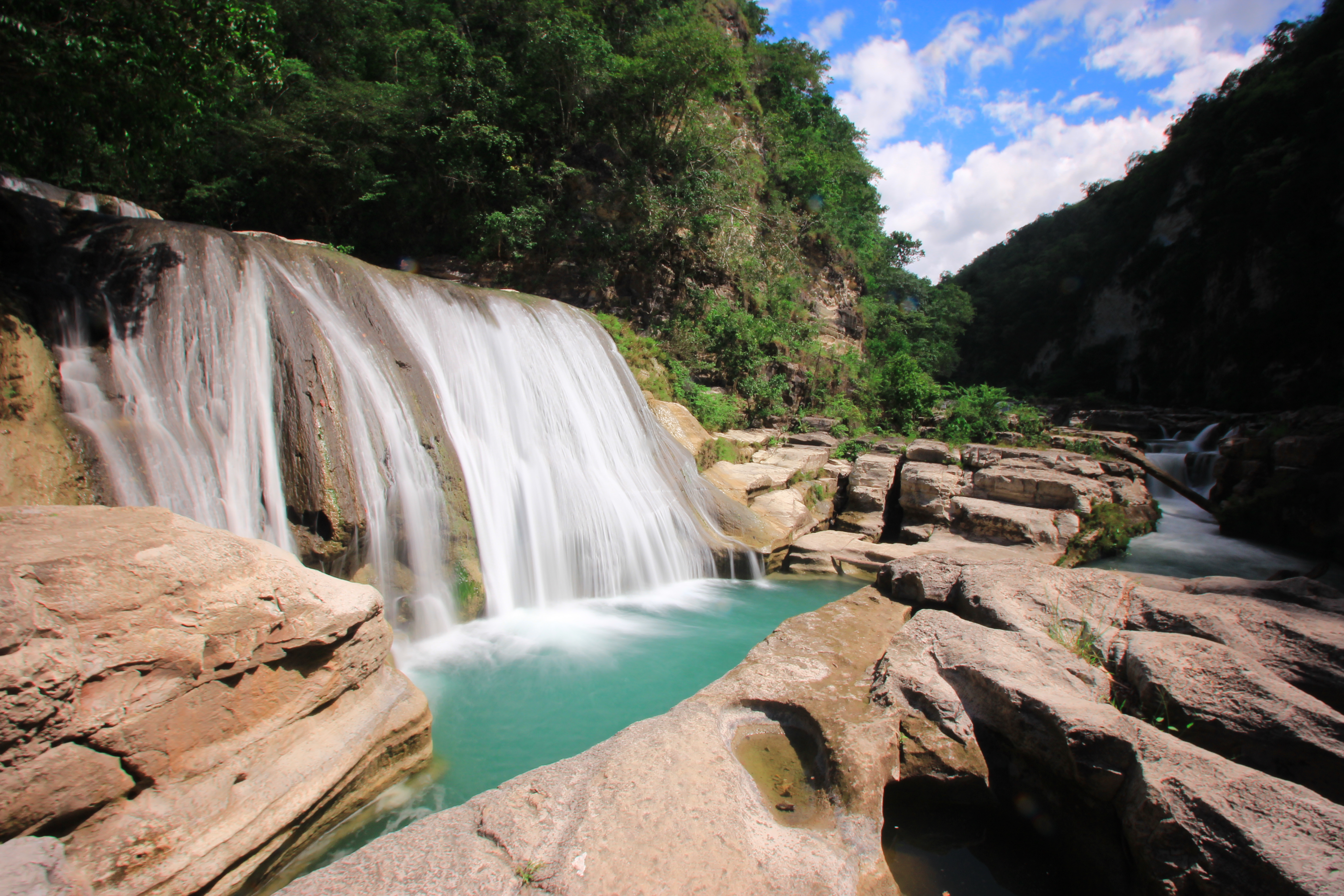 Air Terjun Tanggedu terletak di Desa Tanggedu, Sumba Timur, Provinsi Nusa Tenggara Timur, Indonesia.